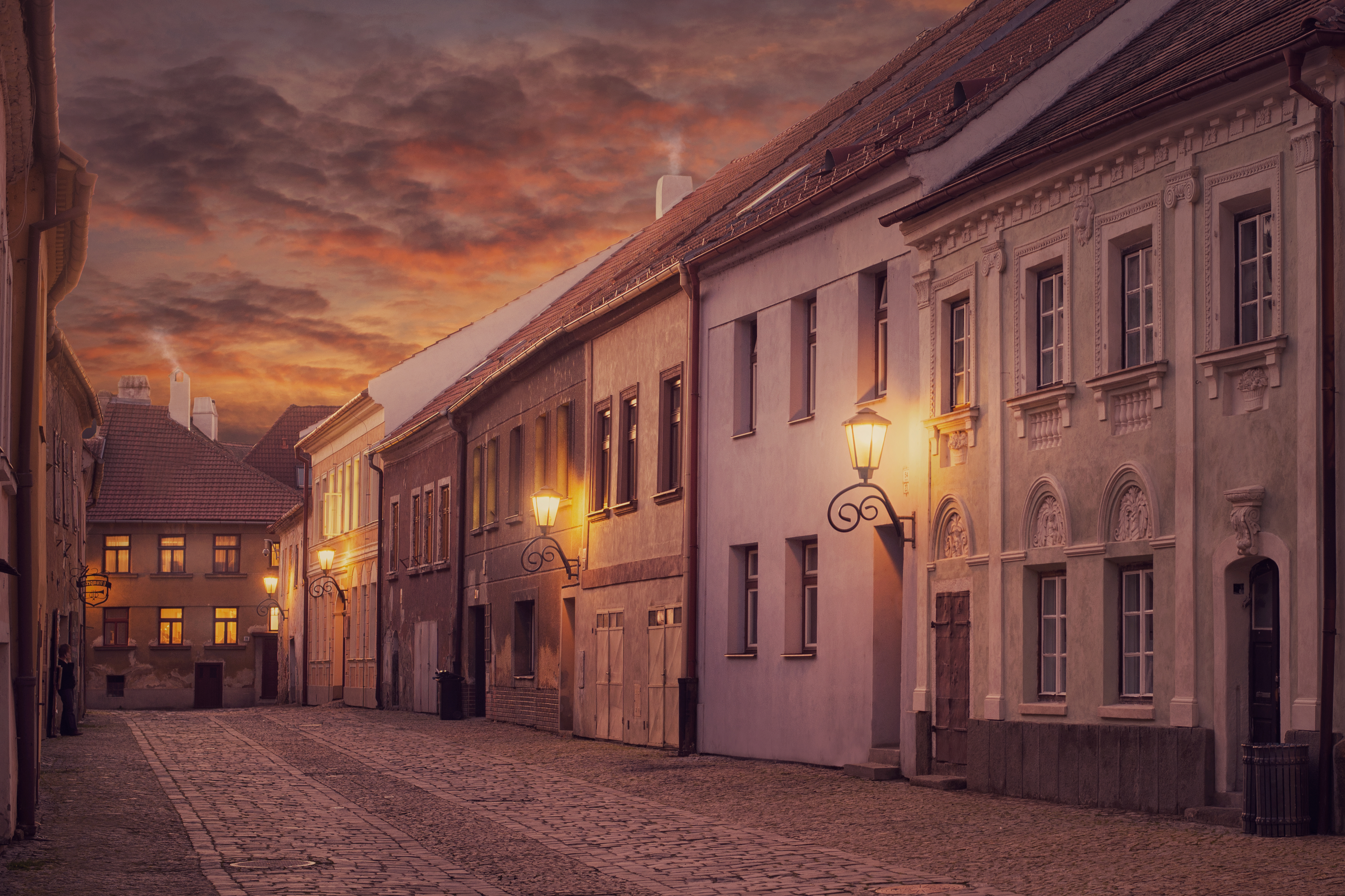 Ulice Leopolda Pokorného v Třebíči